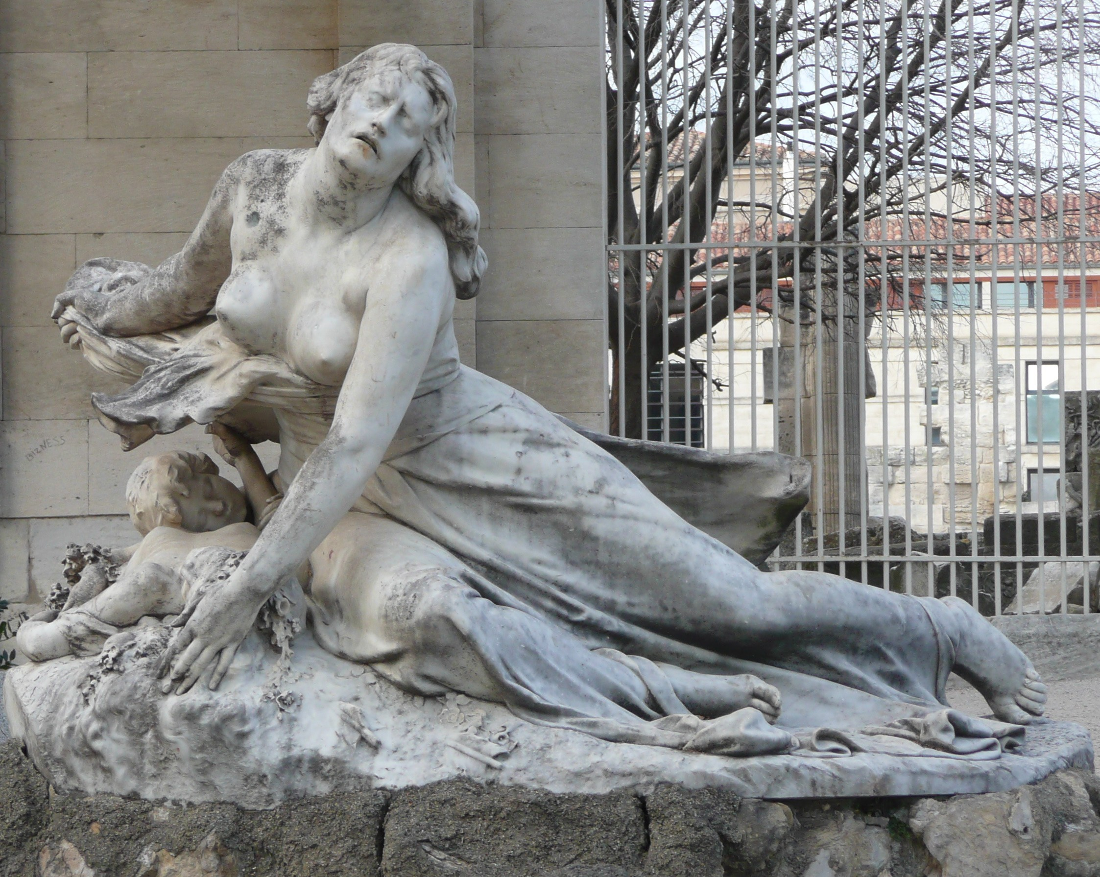 Arles (Bouches-du-Rhône_France), dans le jardin d'été, un peu avant l'entrée sud du théâtre antique, marbre de 1897 d'Hippolyte Lefebvre représentant Niobé, fille de Tantale.